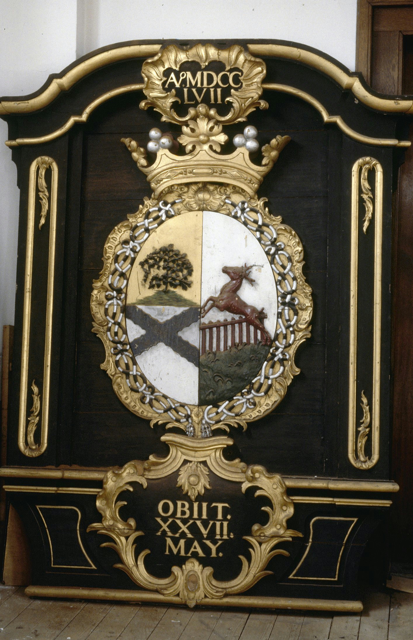 Nederlands Hervormde Kerk: INTERIEUR, ROUWBORD